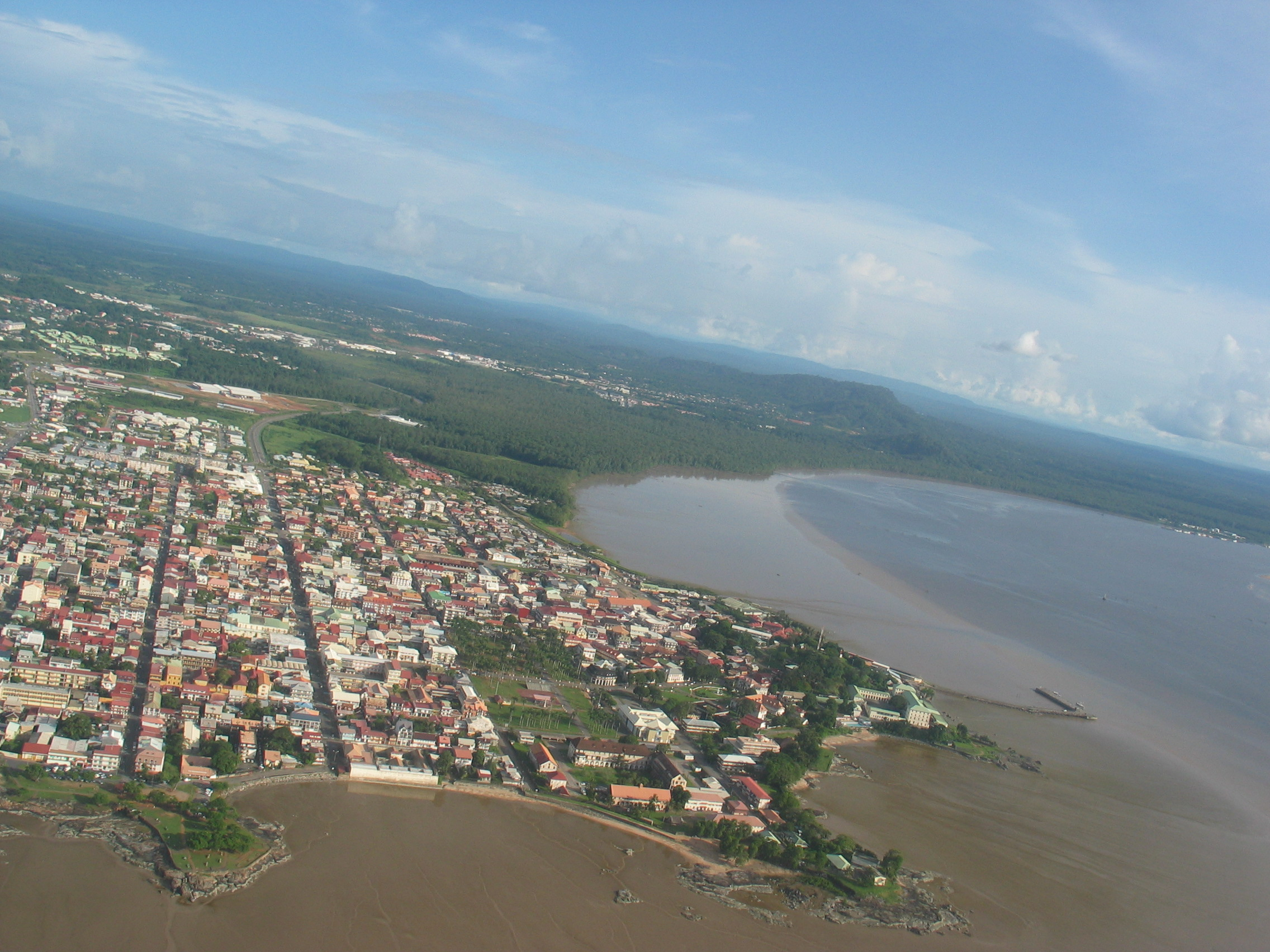 Cayenne vue du ciel. Photo faite par moi même en 2003.